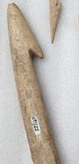 Tête de harpon comparables à ceux issus de la culture de Saqqaq.